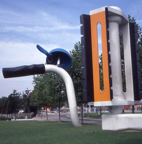 La Vilette